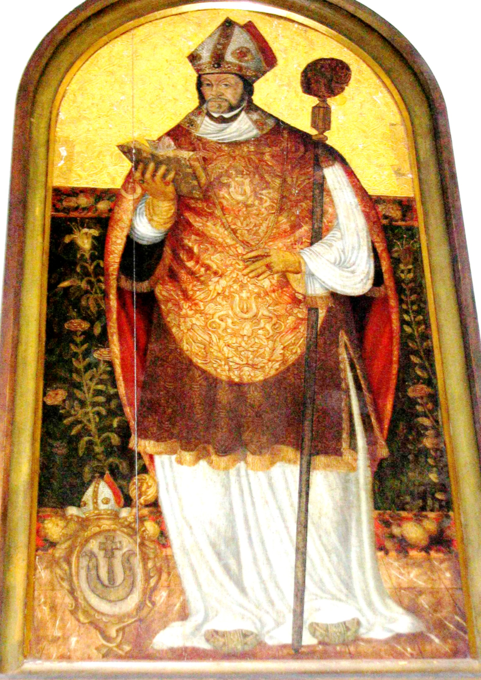 Filip Padniewski Bishop of Kraków author-Maciej Szczepańczyk user:Mathiasrex